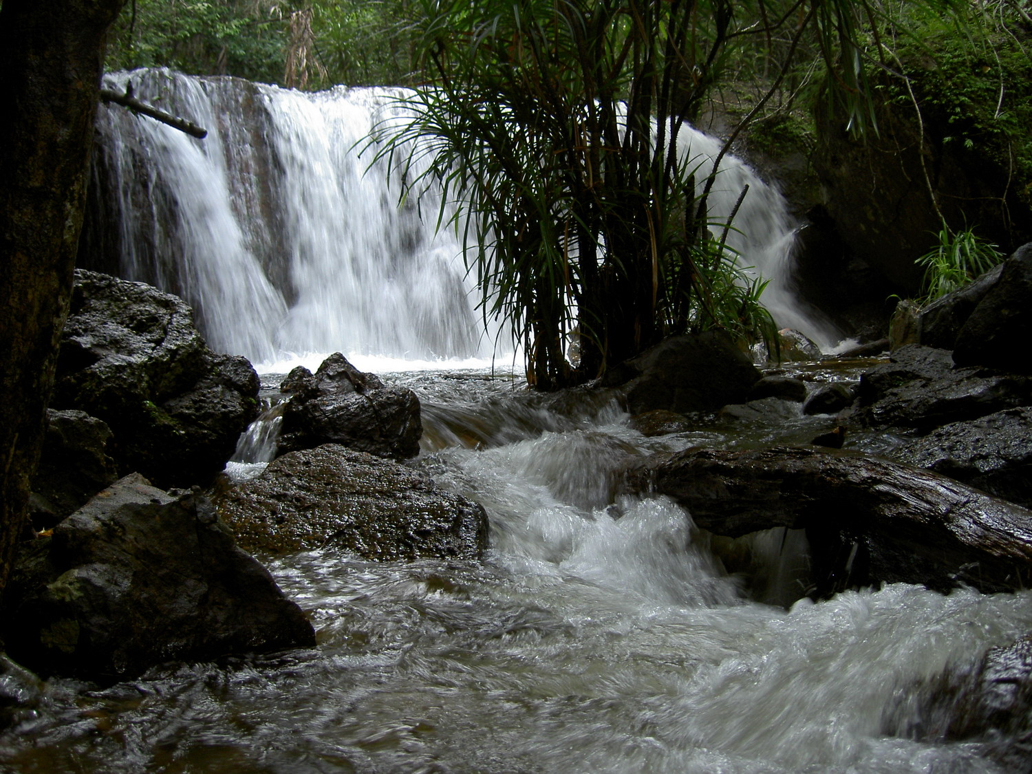 Chute d'eau Tranh, Phu Quoc